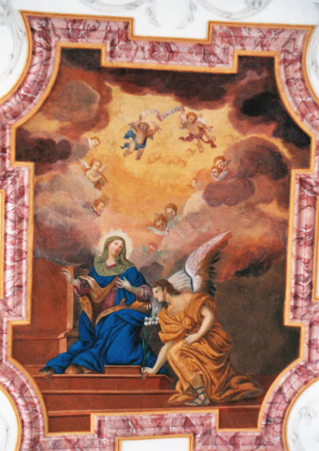 Barocke Deckenfresken in St. Adelgundis in Anhausen (Diedorf): Der Erzengel Gabriel verkündet Maria die Geburt Jesu